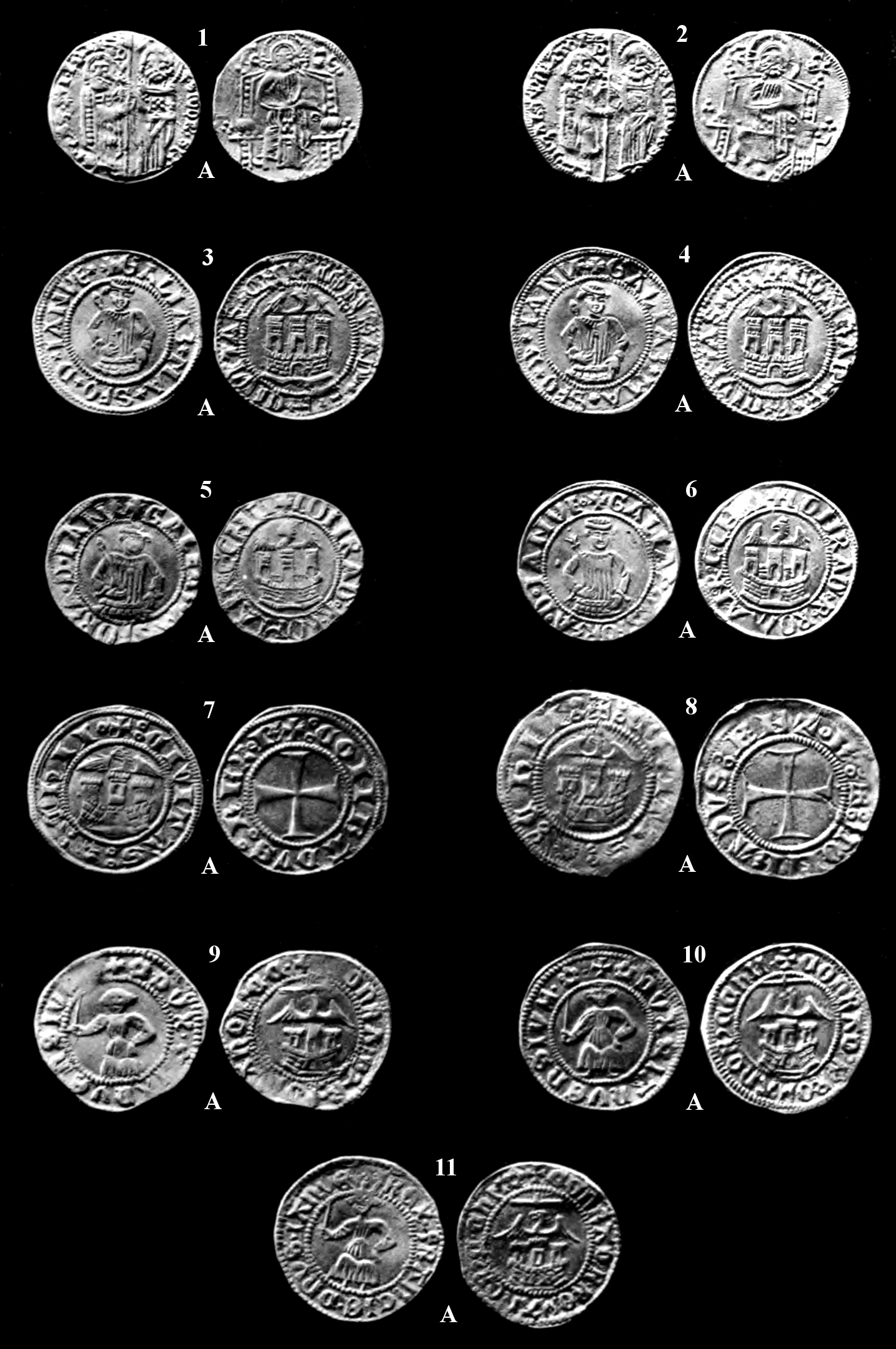 table I from "Rivista italiana di numismatica 1888.djvu p. 15 (../34)